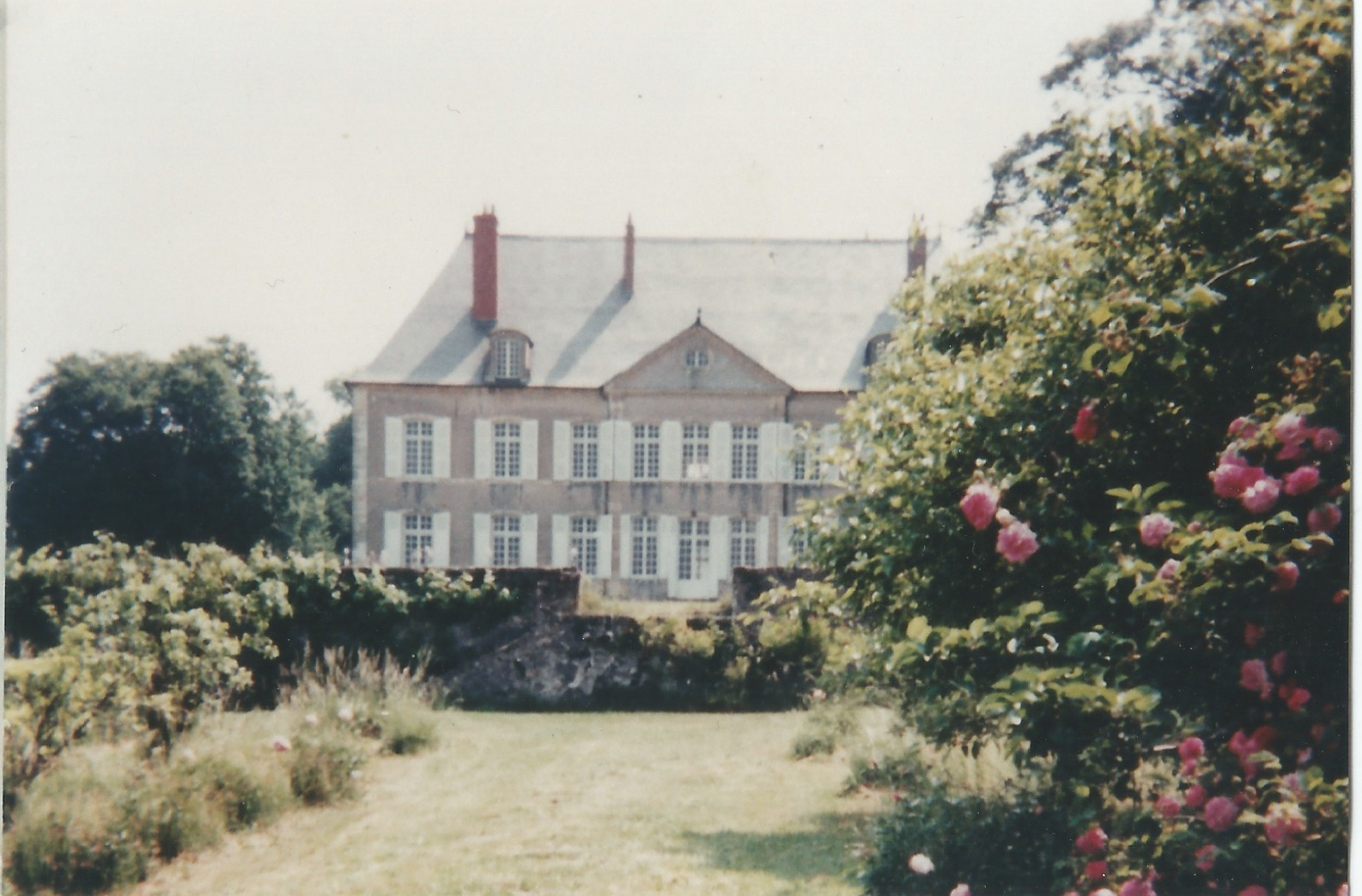 Ch de Sermoise vue O